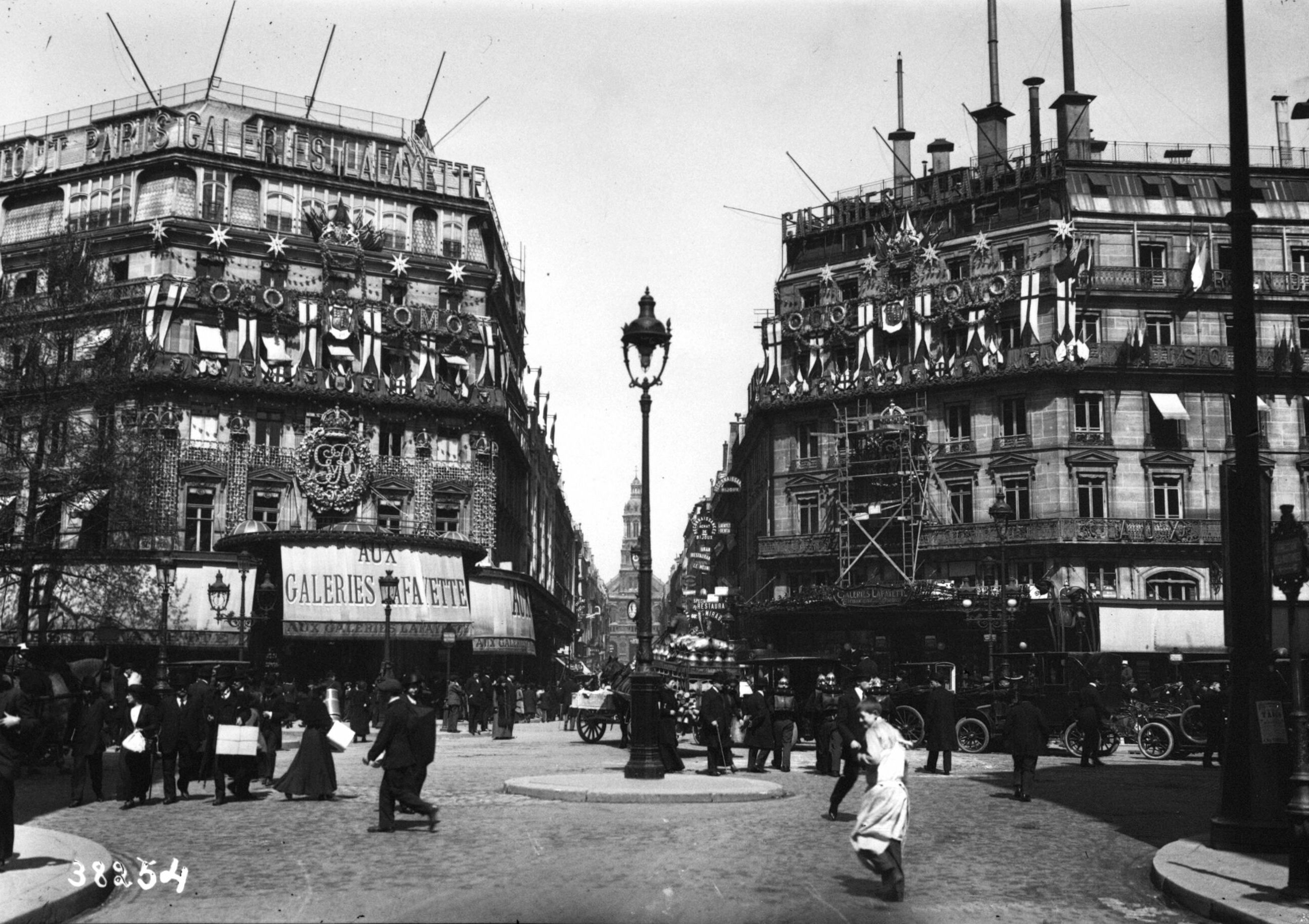 Les Galeries Lafayette décorées pour la visite du roi George V et de la reine Mary du Royaume-Uni à Paris en avril 1914. Au fond, la rue de la Chaussée d'Antin et l'église de la Trinité.